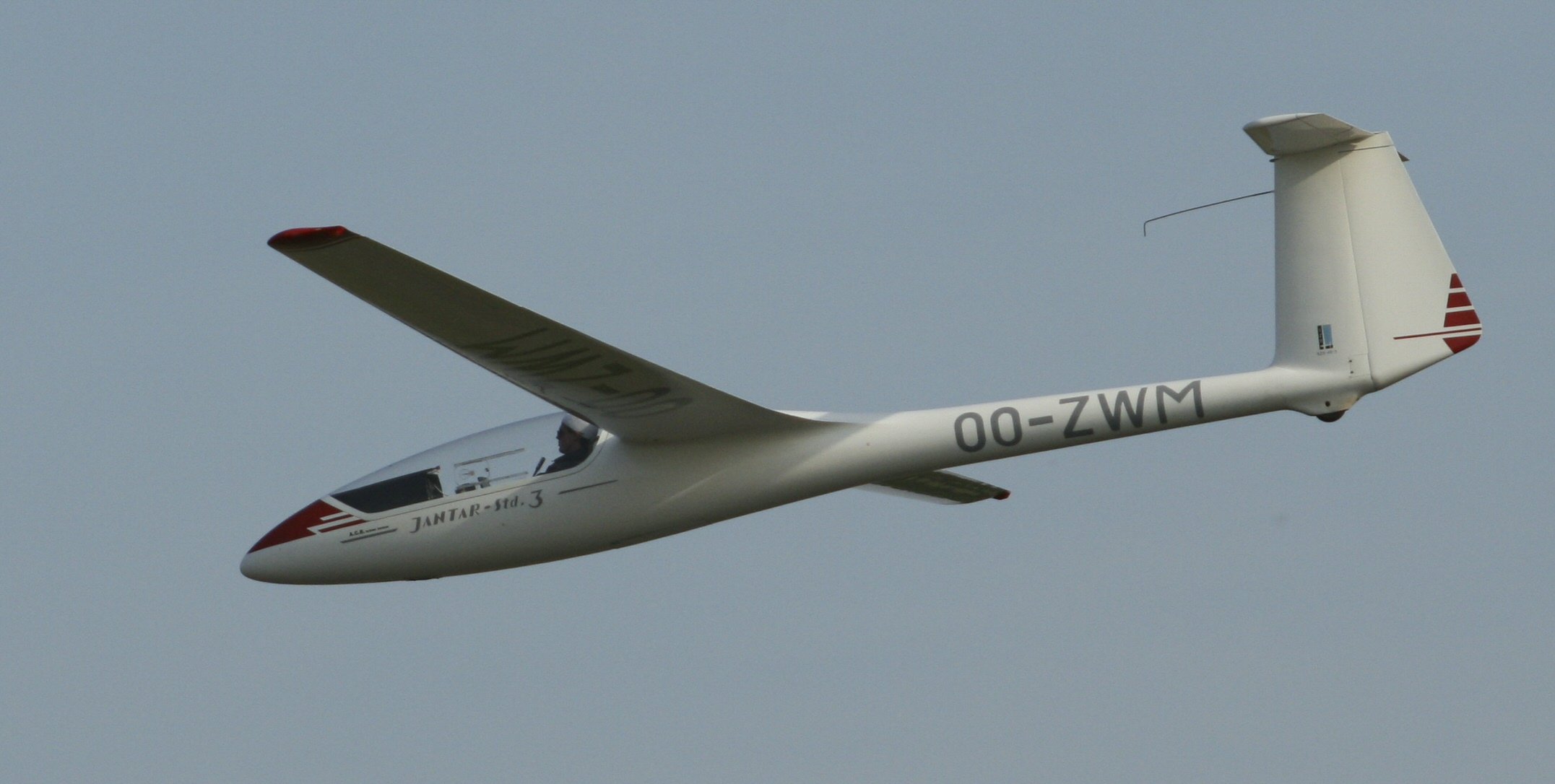 PZL Bielsko SZD-48 Jantar Standard 3